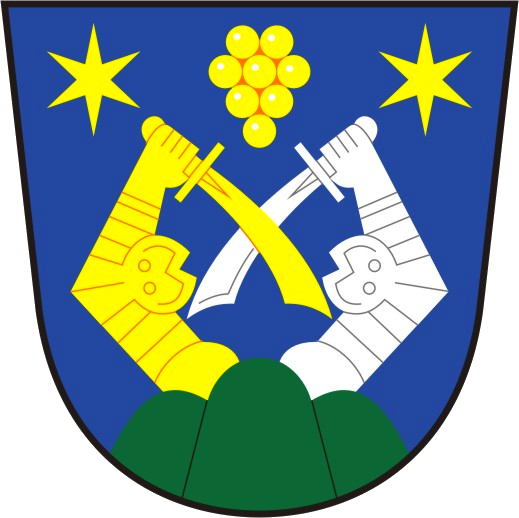 znak obce Svárov (okres Uherské Hradiště).